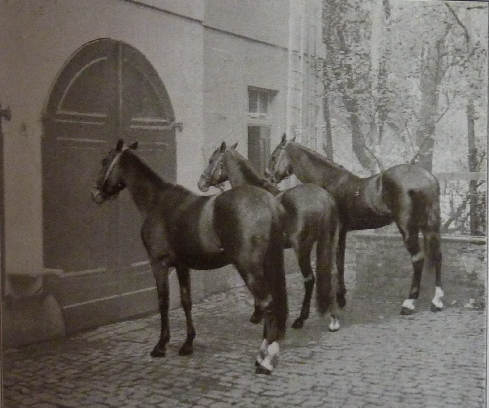 Zarif, Muhamed und der kluge Hans vor ihrem Unterrichtsraum in Elberfeld